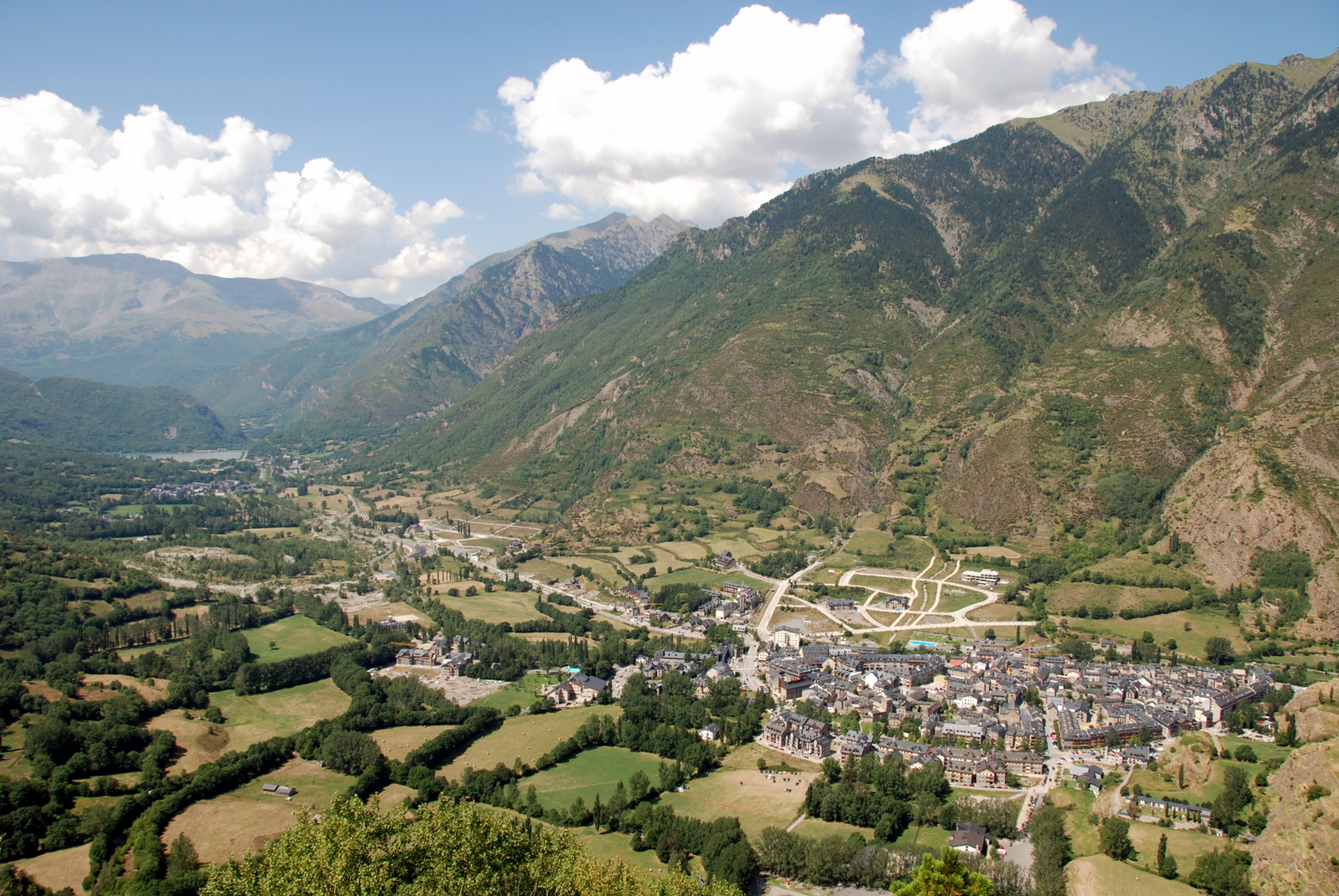 Valle de Benasque. Al fondo se puede ver el embalse de Llinsoles.